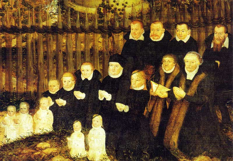 Paul Eber’s Familie im Ausschnitt aus seinem Epitaph in der Stadtkirche der Lutherstadt Wittenberg gemalt von Lucas Cranach d. J.